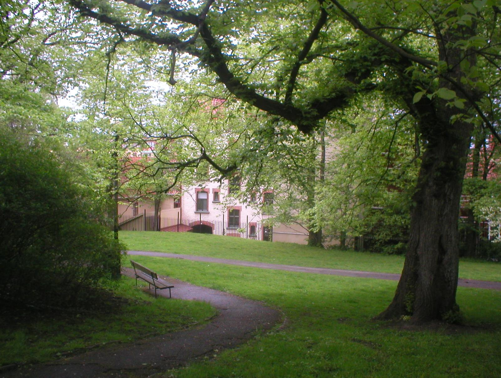 Foto av Jedeurska trädgården, Majorna, Göteborg, taget av Per Johansson 2005.